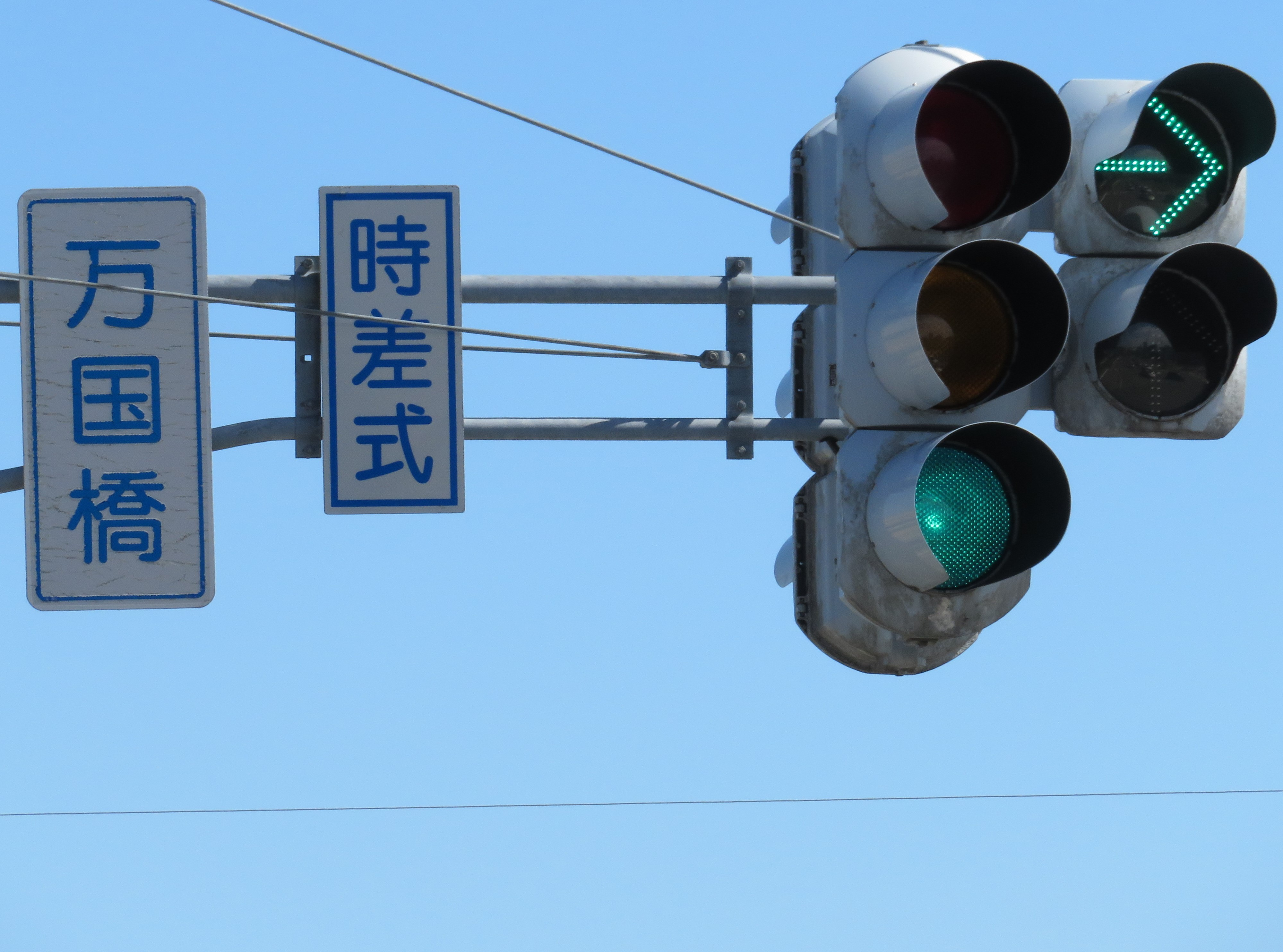 新潟市中央区国道113号線万国橋交差点に設置されている時差式信号機（青表示＋右折矢印表示） Canon PowerShot SX720 HS